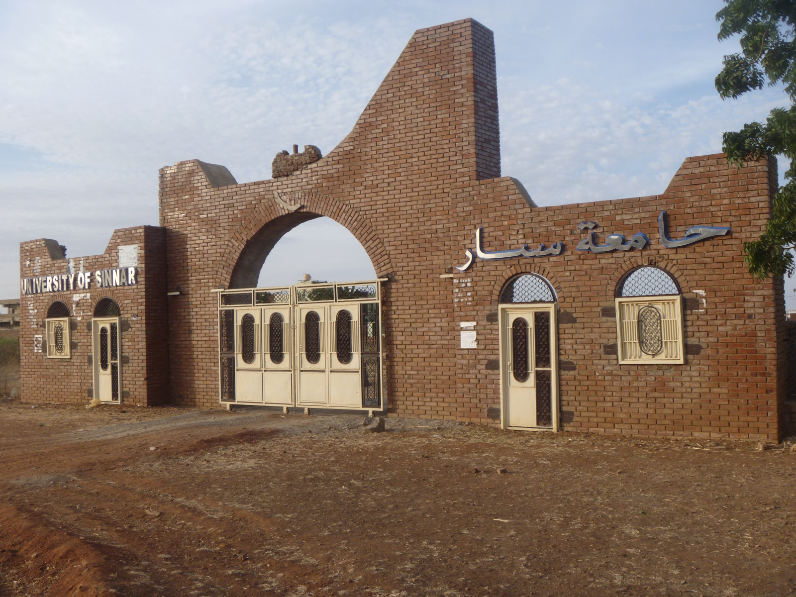 بوابة جامعة سنار - مجمع مدينة سنار.